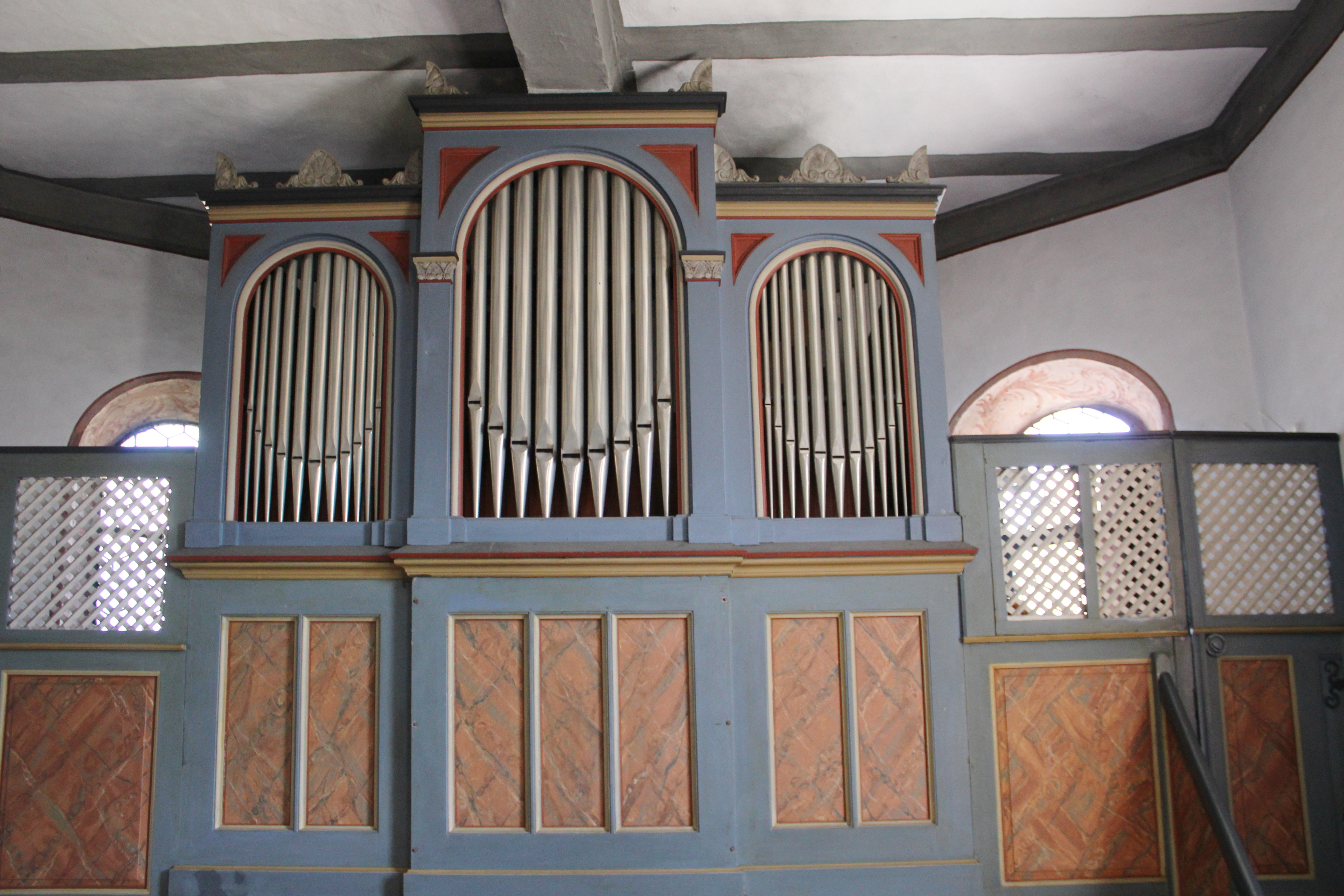 Evangelische Kirche Oberquembach, Gemeinde Schöffengrund, Hessen, Deutschland